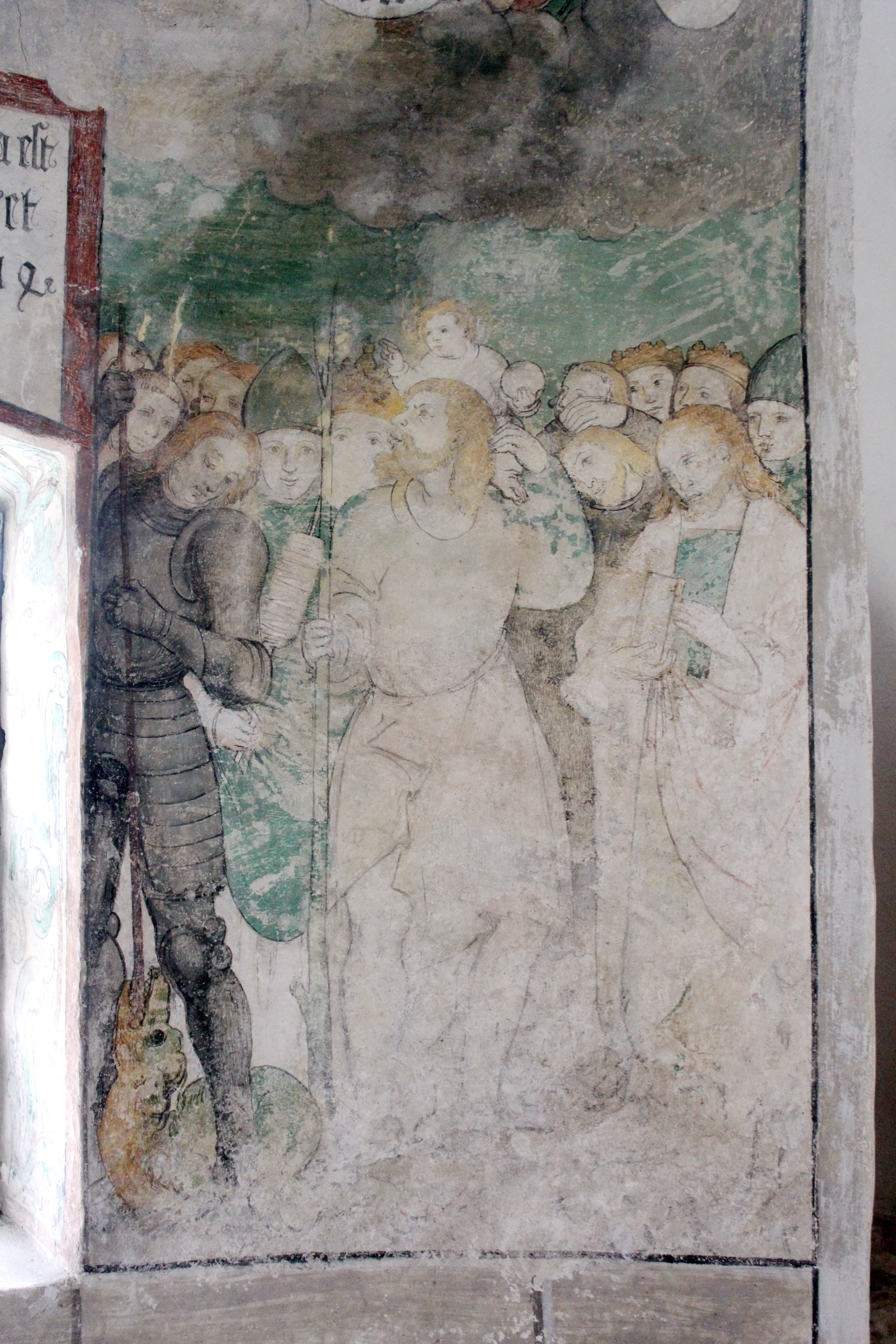 Weithin sichtbar über dem alten Stadtkern auf der Südseite der Burg Veringen in Veringenstadt steht eine romanische Kapelle. Sie ist den Heiligen Petrus und Paulus geweiht, wird aber von alters her allgemein Peterskapelle oder im Volksmund Peterskirchle genannt. Die Erbauung geht in das 10. oder 11. Jahrhundert zurück. Die Fresken (um 1515) stammen von Peter Strüb dem Jüngeren aus Veringenstadt, auch Meister von Sigmaringen genannt.